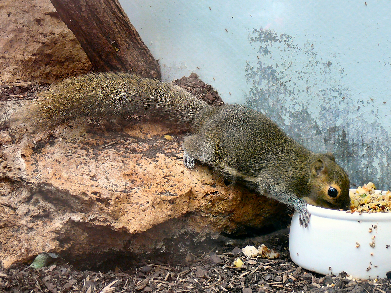 Callosciurus notatus (Plantain Squirrel). Wilhelma zoo - Stuttgart - Germany